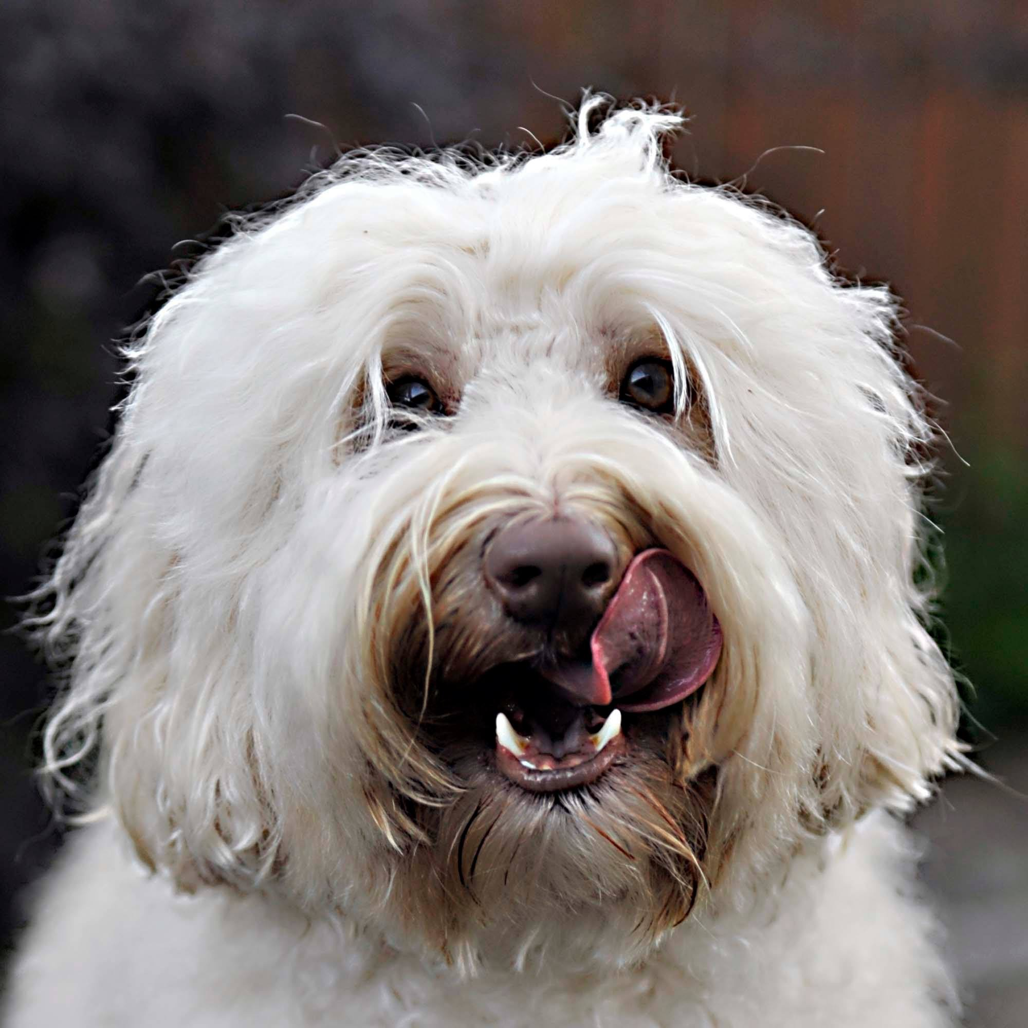 Medium kokoinen uros